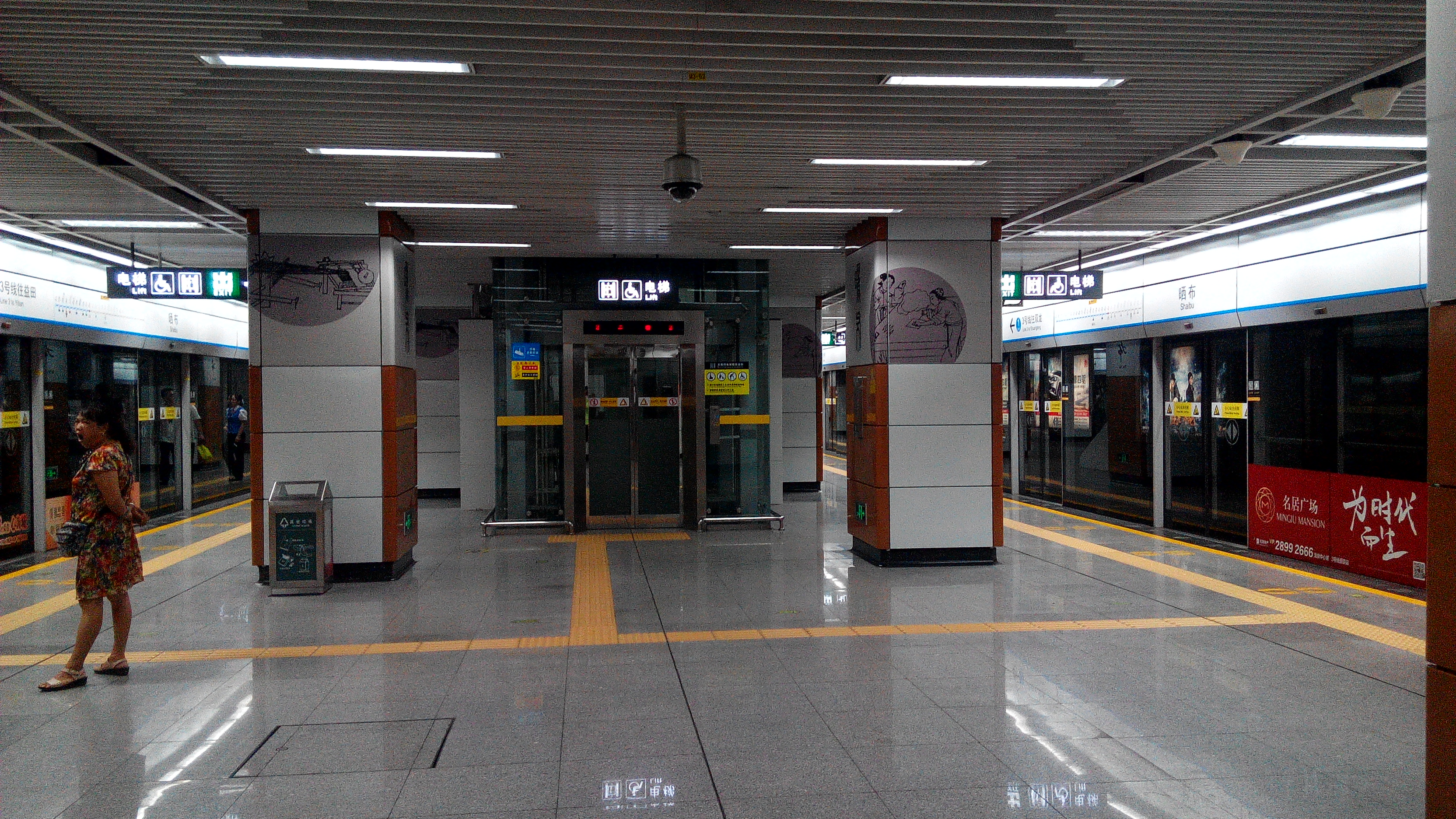 深圳地铁三号线 晒布站站台